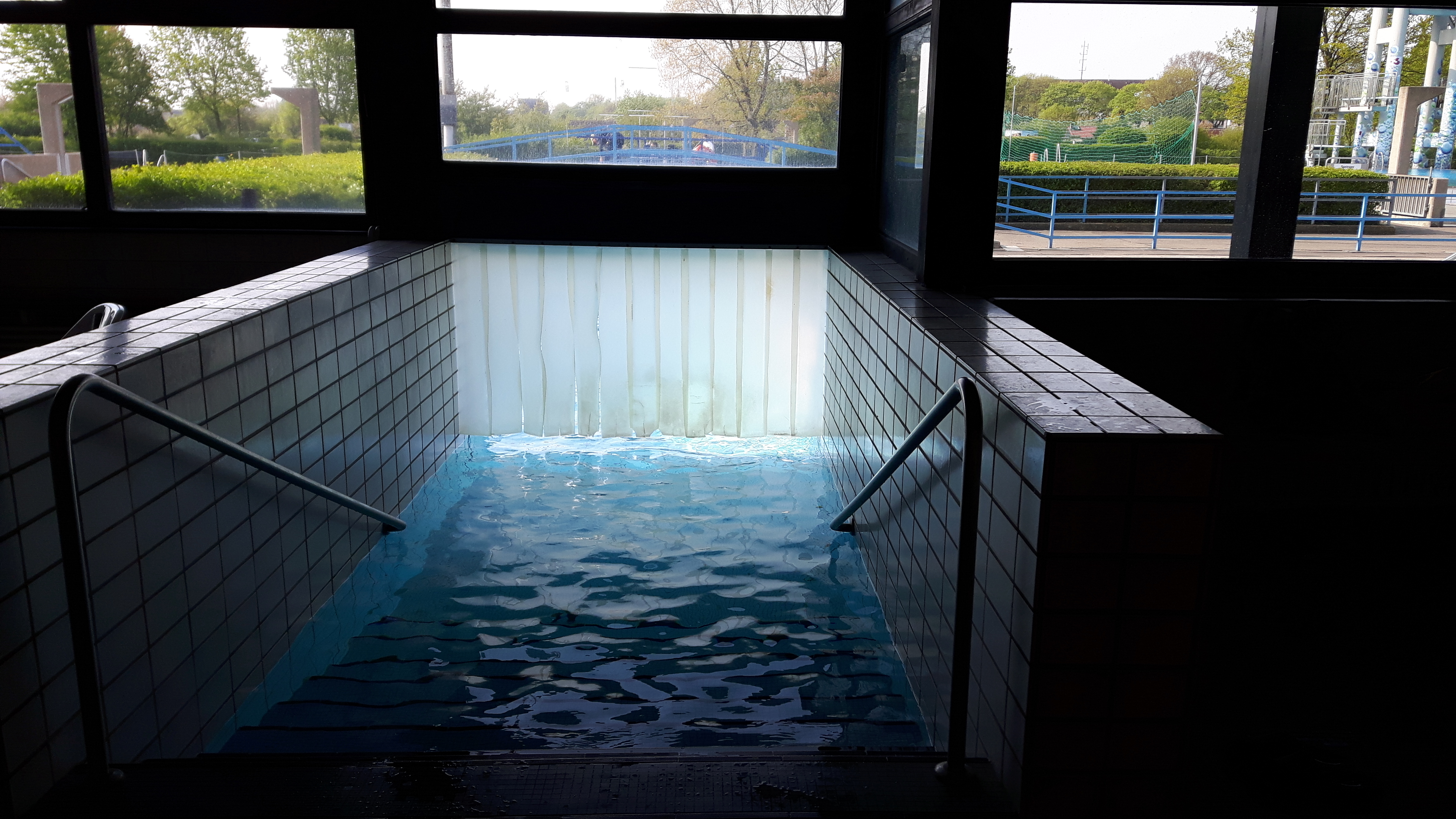 Einschwimmkanal aus der Wärmehalle des Lister Bads, 1.5.2017, Hannover